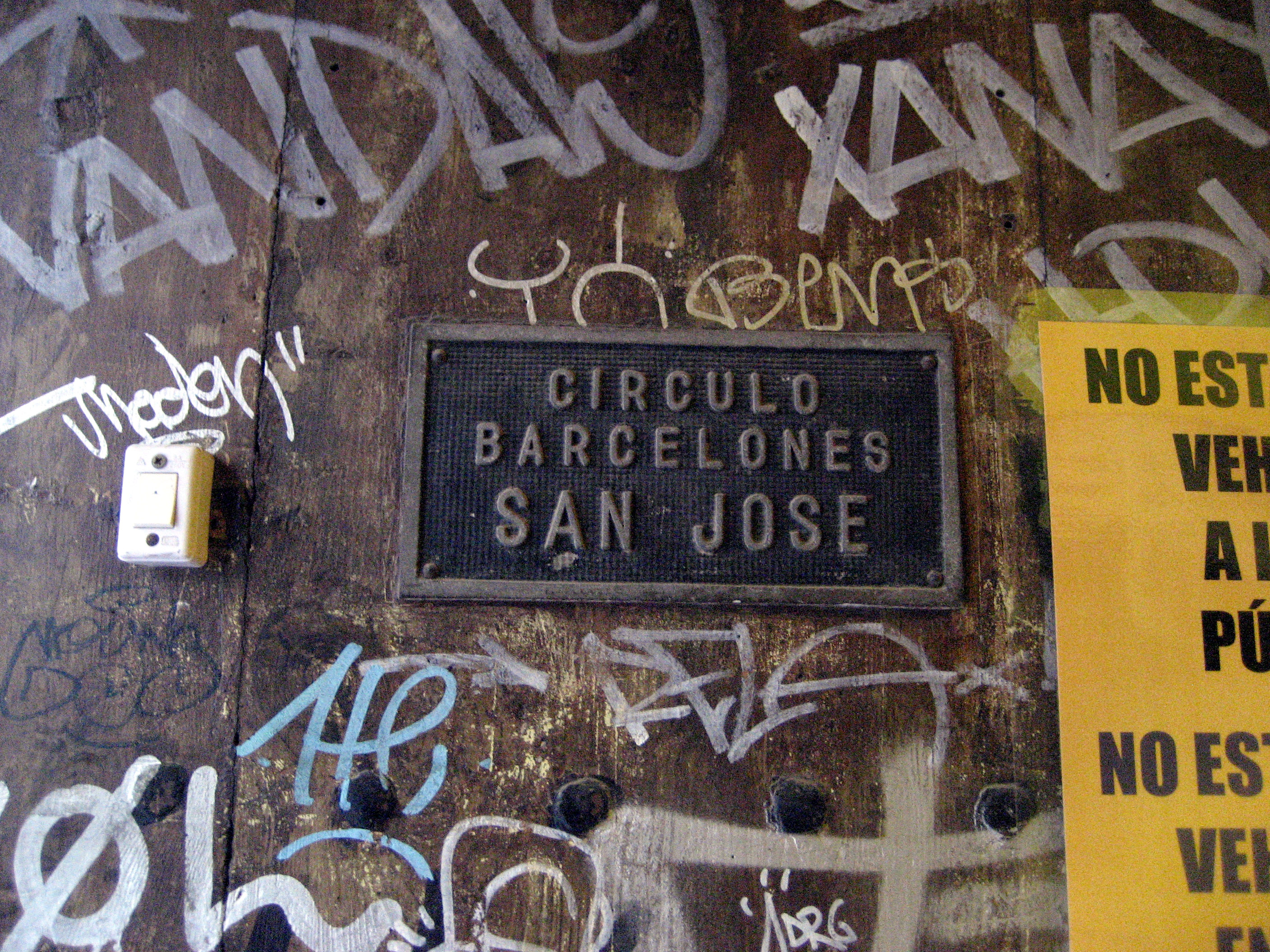 Placa a la porta principal de l'antic "Cercel Barcelonès de Sant Josep". Juliol 2009